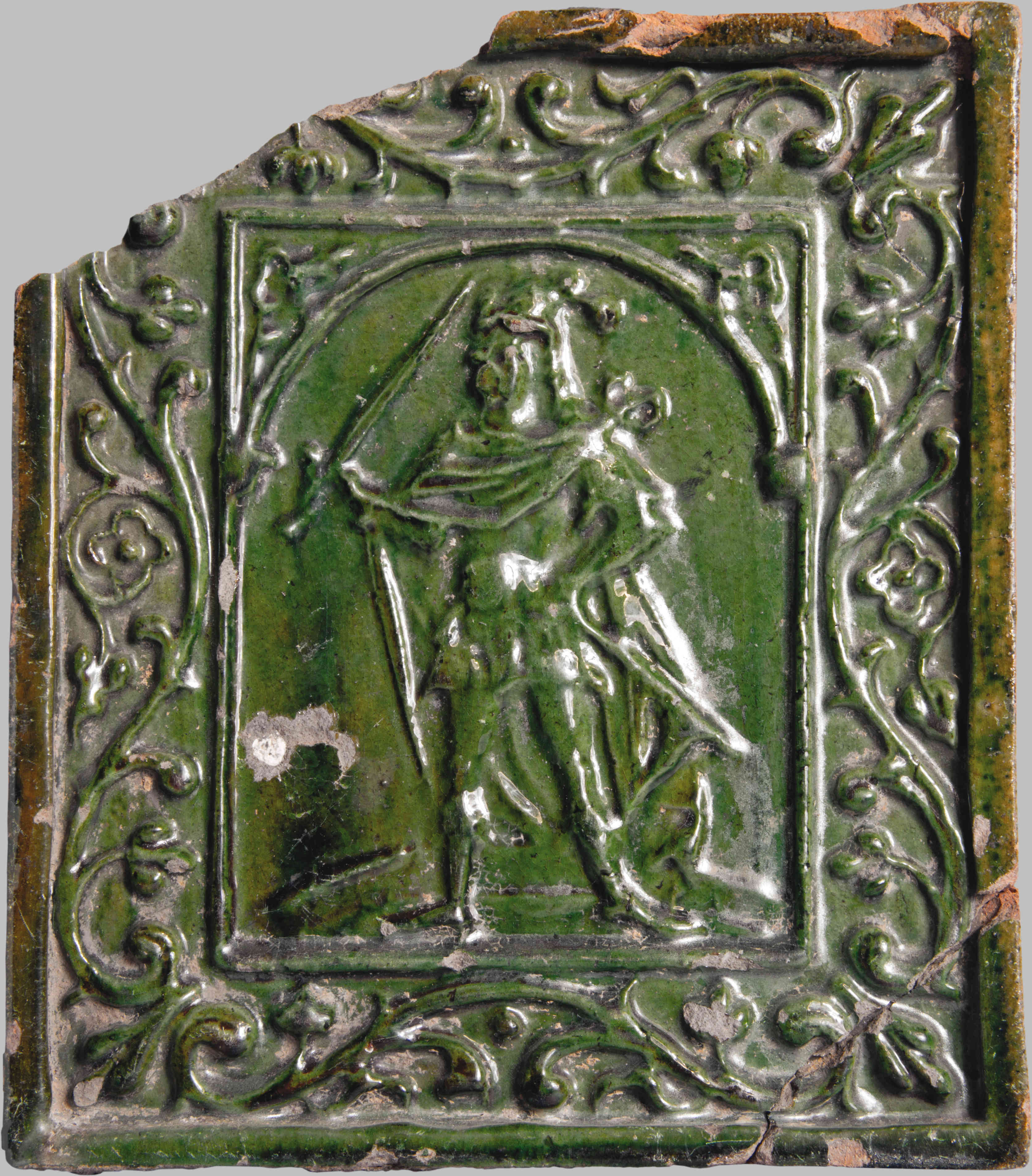 35×25 см